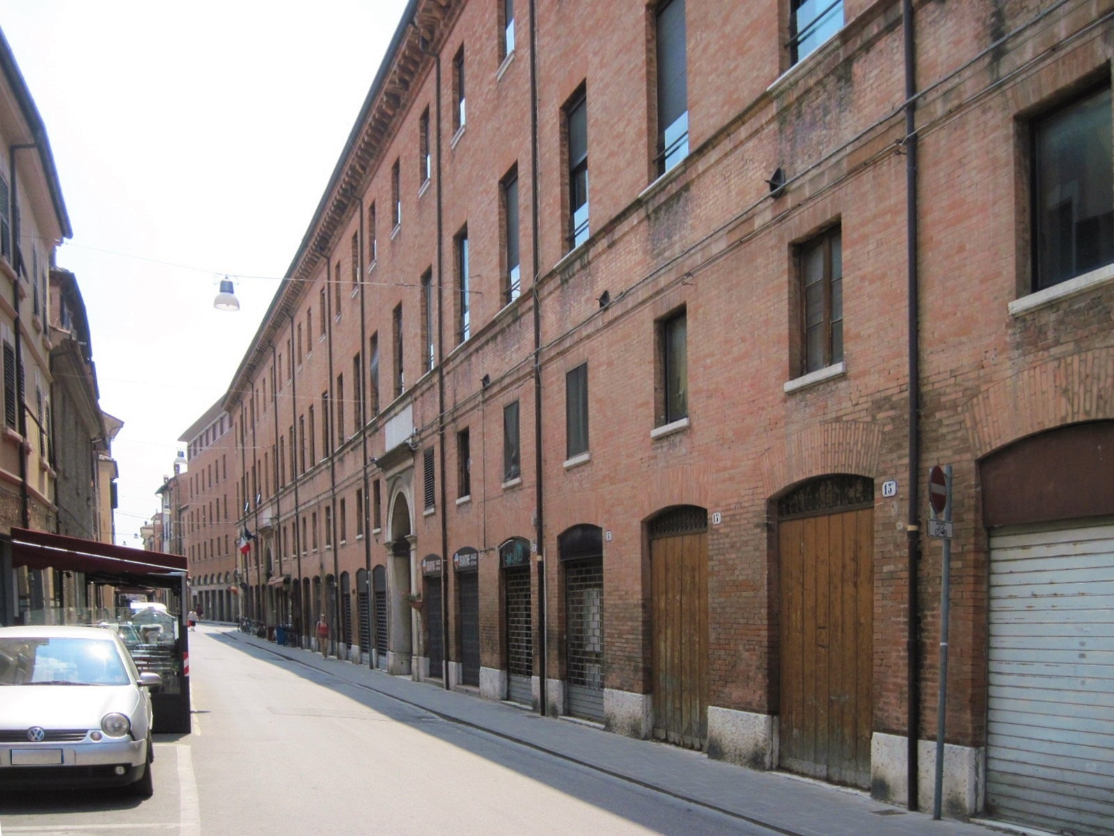 Via Ripagrande